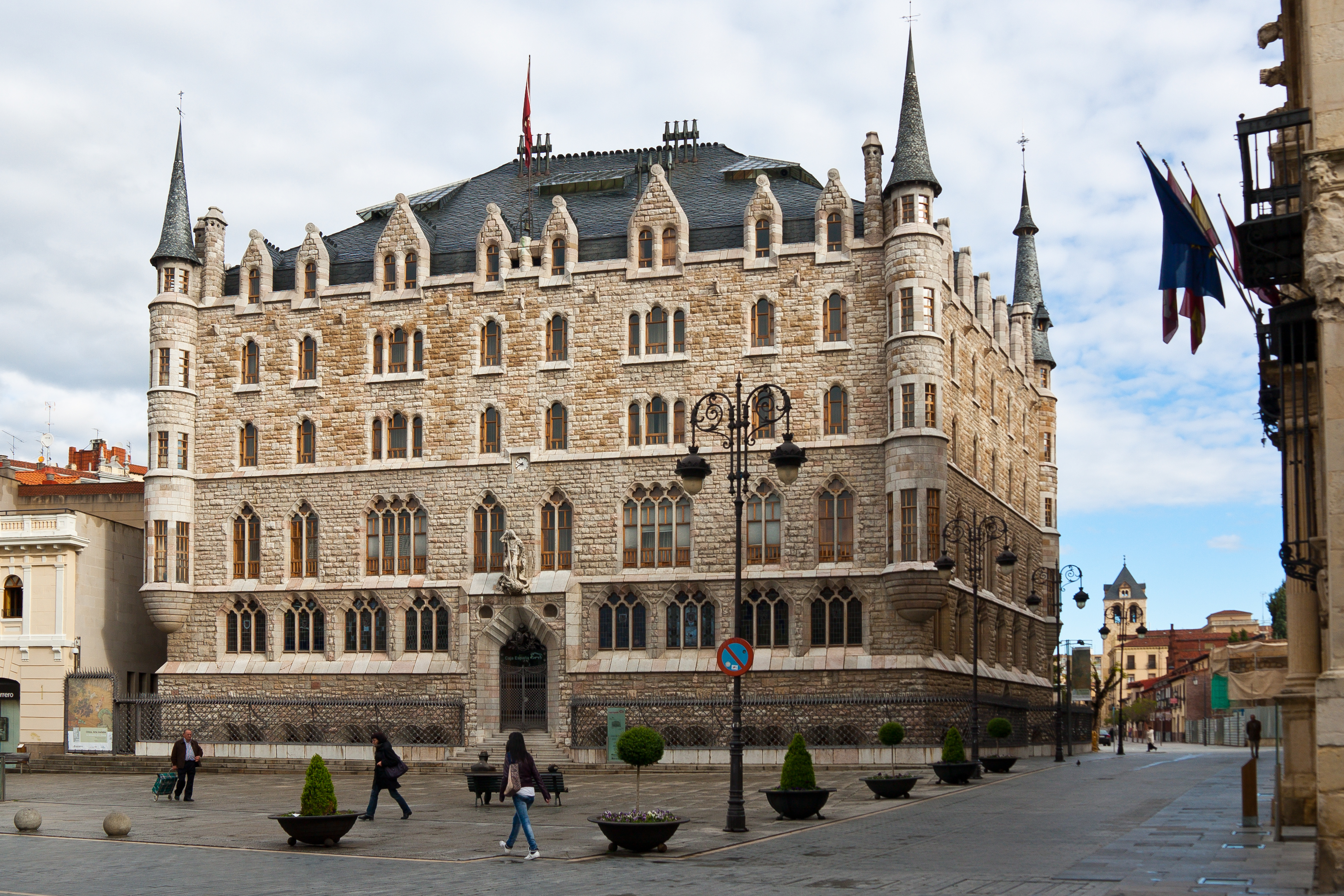 Casa Botines